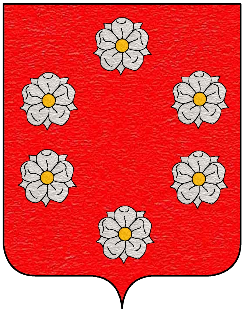 Stemma della famiglia Tudisi